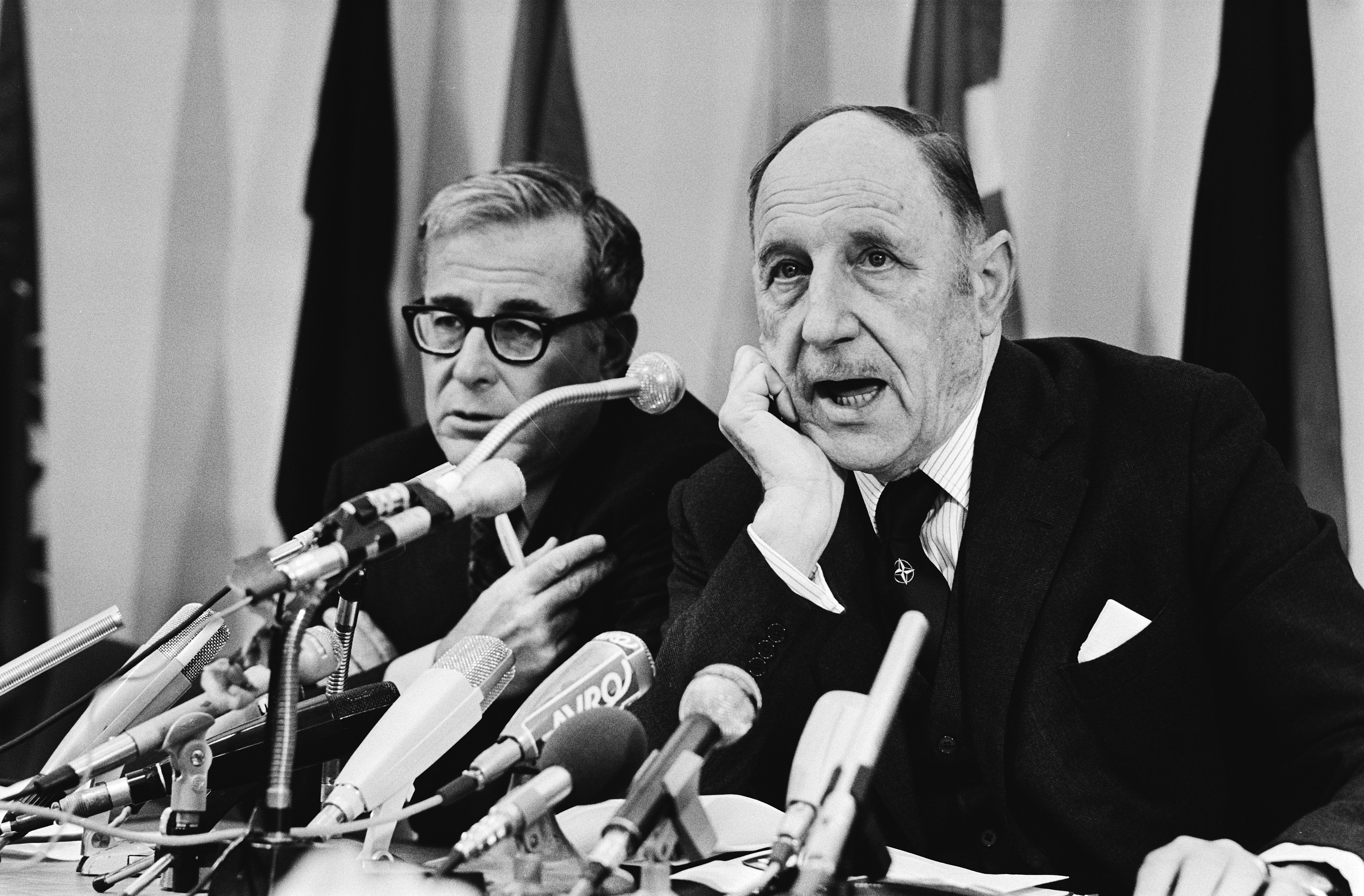 Collectie / Archief : Fotocollectie Anefo Reportage / Serie : Persconferentie na NATO overleg in Den Haag van NATO Beschrijving : Harold Brown (l) en Joseph Luns Datum : 14 november 1979 Locatie : Den Haag, Zuid-Holland Trefwoorden : ministers, persconferenties, voorzitters Persoonsnaam : Harold Brown, Luns, Joseph Instellingsnaam : NAVO Fotograaf : Croes, Rob C. / Anefo Auteursrechthebbende : Nationaal Archief Materiaalsoort : Negatief (zwart/wit) Nummer archiefinventaris : bekijk toegang 2.24.01.05 Bestanddeelnummer : 930-5407